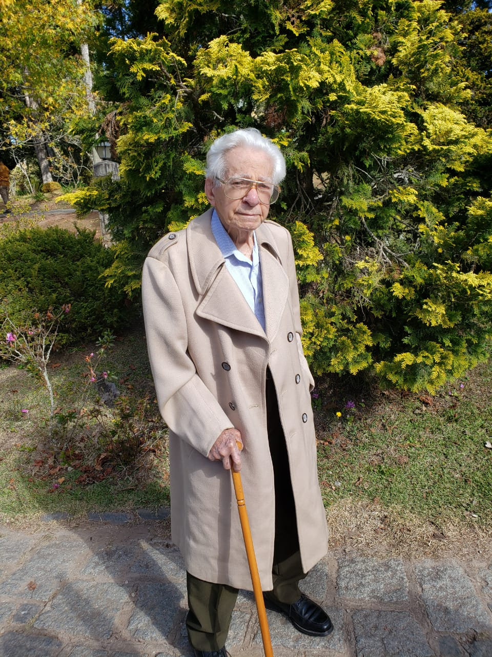 O editor brasileiro Gumercindo Rocha Dorea no Mosteiro de São João, em Campos do Jordão, 2019.